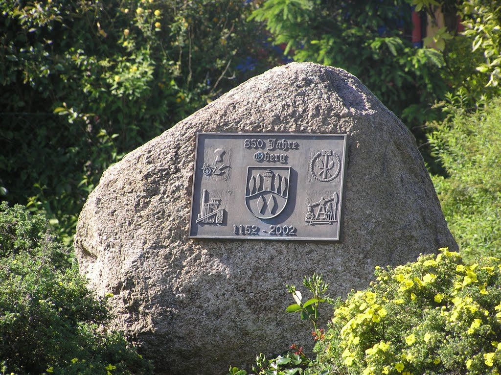 Oberger Gedenkstein zum 850 Jährigen Bestehen.